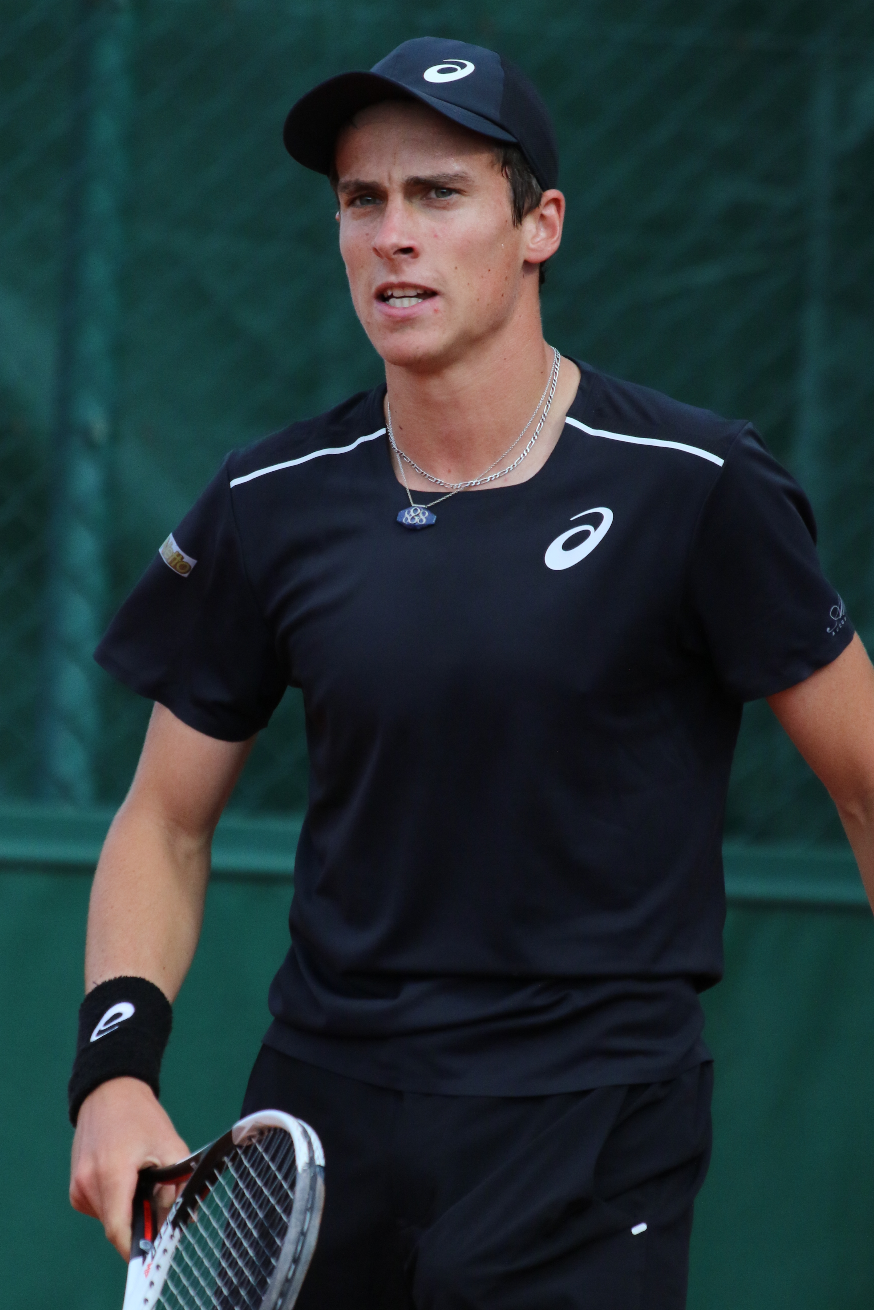 Blancaneaux RG18 (19)